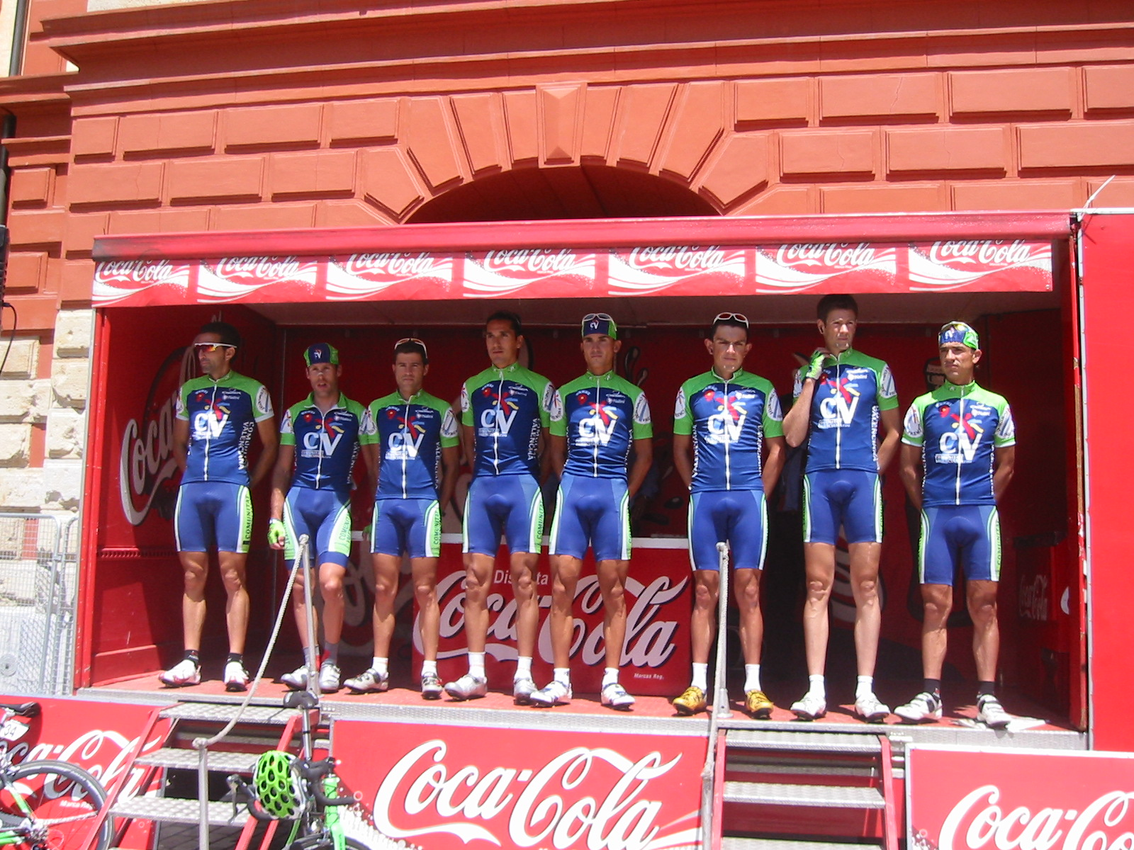 Comunidad Valenciana, Euskal Bizikleta 2005